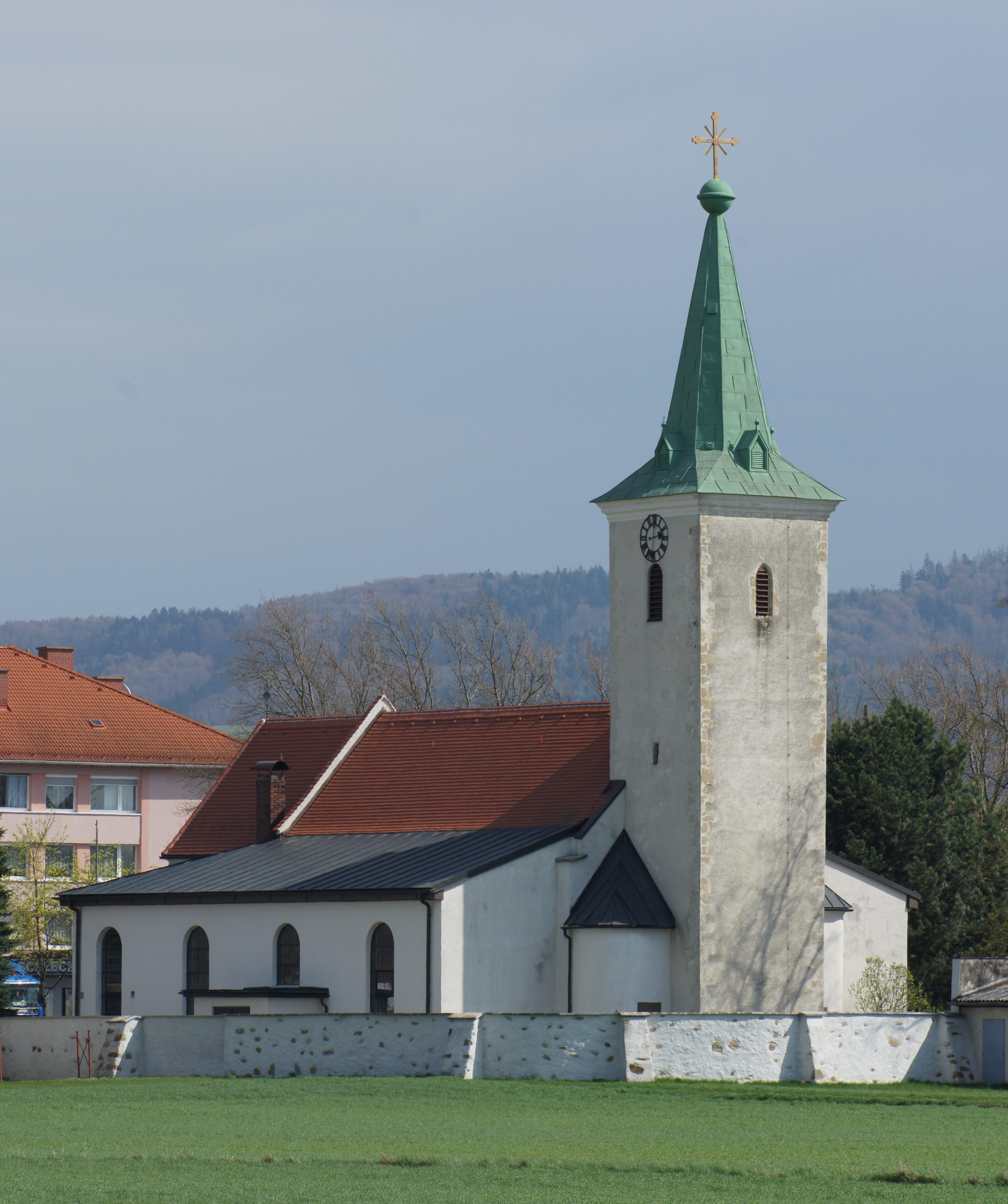 Die Pfarrkirche im St. Pöltner Stadtteil St. Georgen am Steinfelde